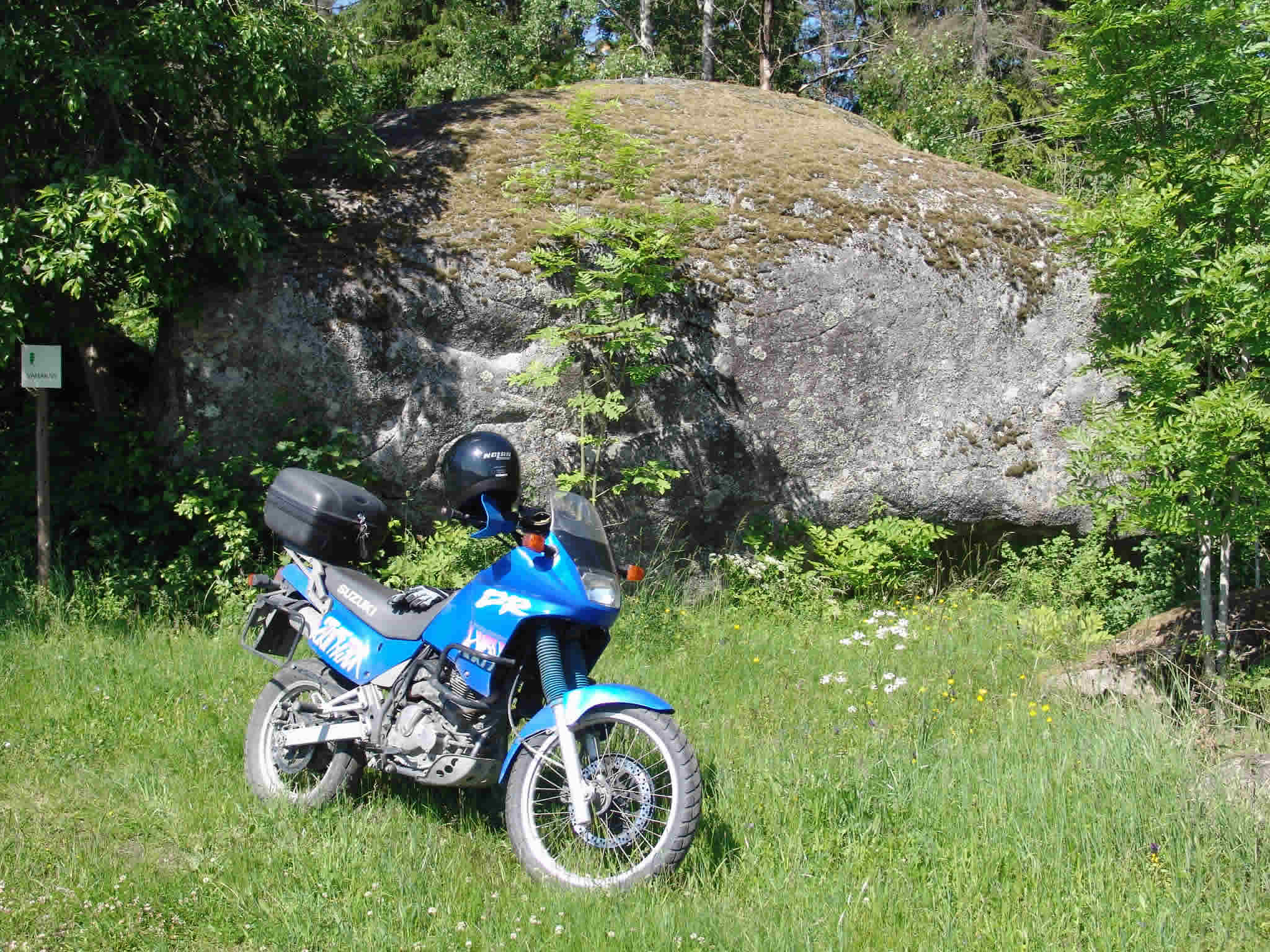 Vahakivi